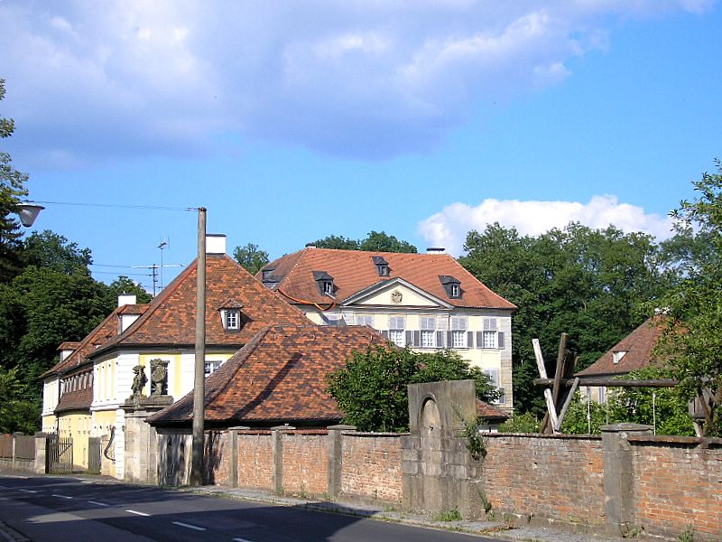 Schloss Birkenfeld (Landkreis Haßberge, Unterfranken) / Birkenfeld Castle, Lower Franconia, Germany. Ansicht von Südwesten / View from southwest. Eigene Aufnahme, Juni 2006 / Own photo, June 2006